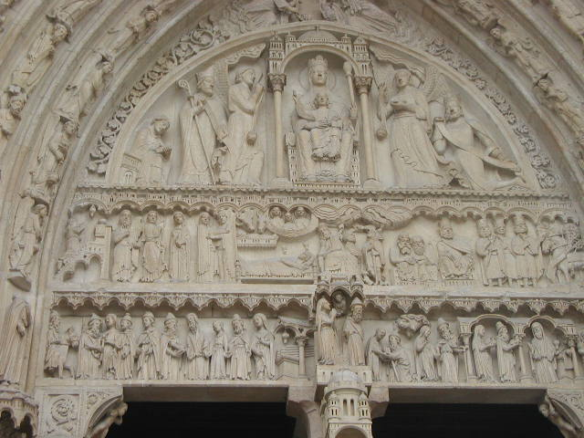 Notre-Dame de Paris. Tympan du portail Sainte-Anne